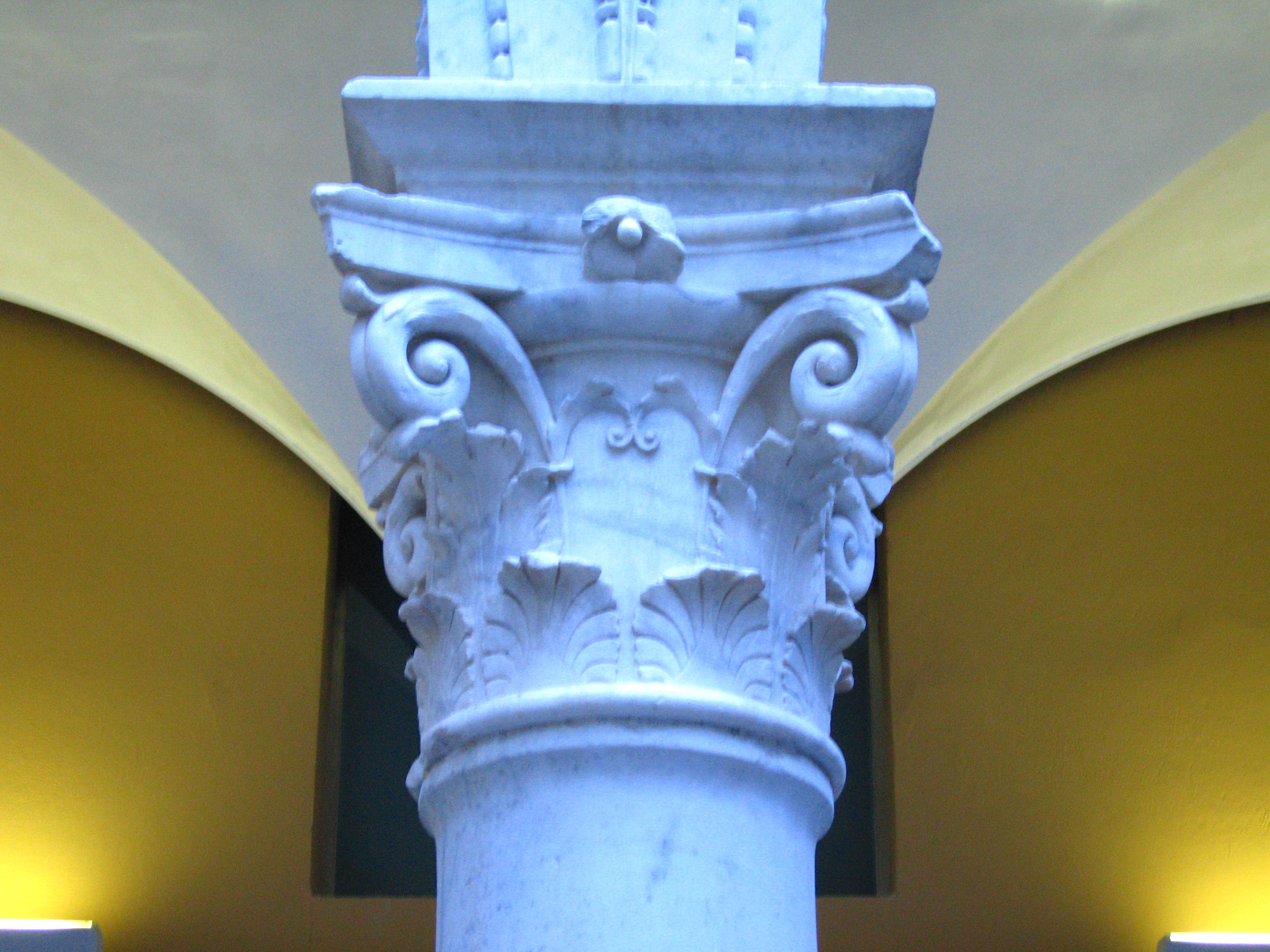 Pati de l'Ambaixador Vich, sant pius V (València)